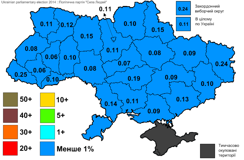 Результати виборів до Верховної Ради України, які відбулись 25 жовтня 2014 року. Інформація з офіційного сайту ЦВК. Політична партія "Сила Людей".